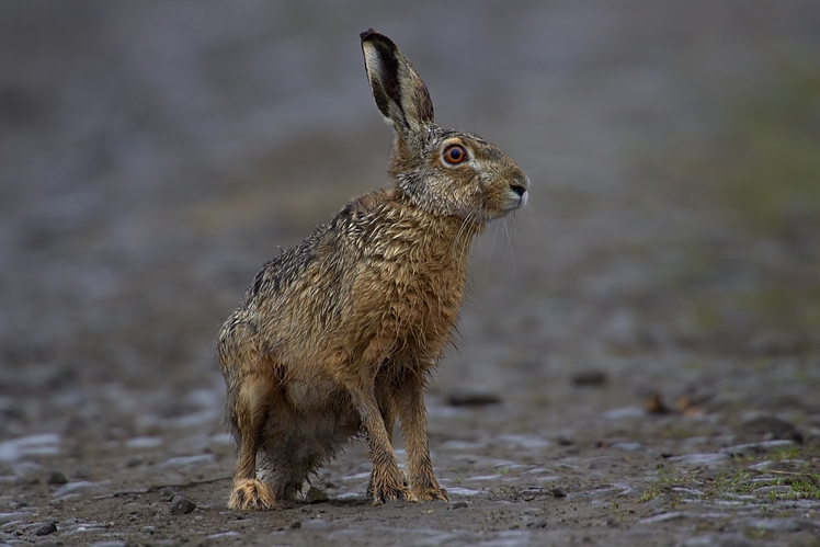 Lepus europaeus, Kroměříž, CZ